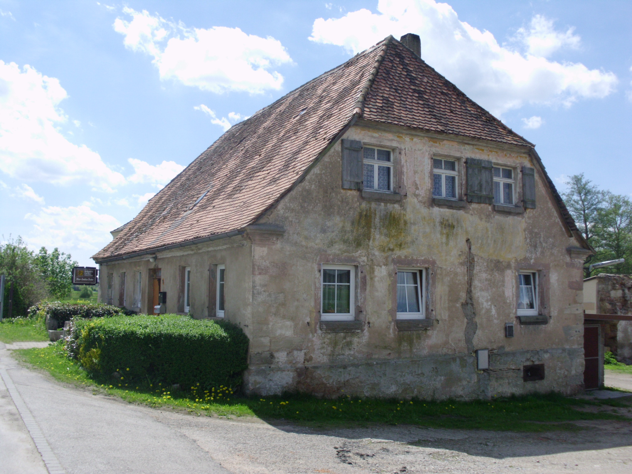 Schnackenmühle, Ortsteil von Gunzenhausen im mittelfränkischenLandkreis Weißenburg-Gunzenhausen